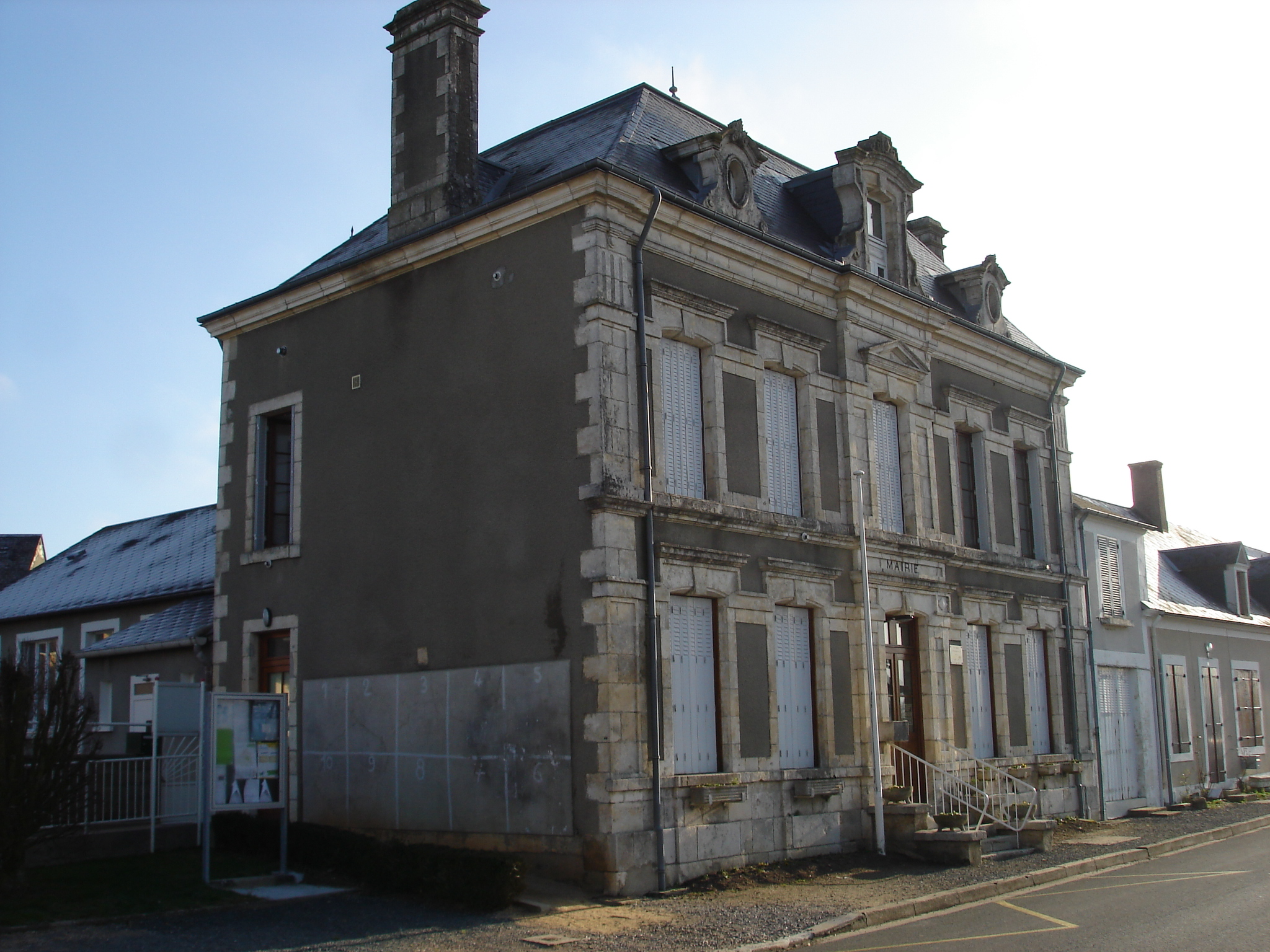 La Berthenoux (36) : La mairie.